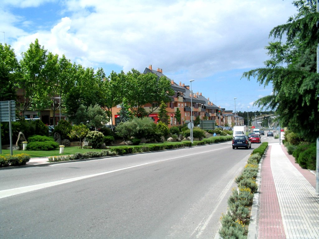 Avenida de Madrid